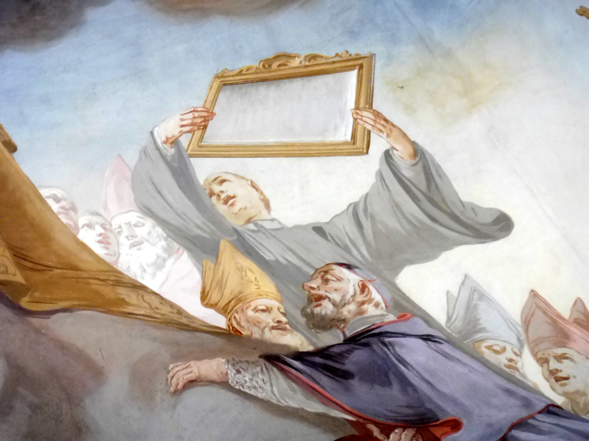 Anselm von Canterbury mit Spiegel - Kuppelfresko von Matthäus Günther (1761 - 63) - ehemalige Benediktiner-Abteikirche in Rott am Inn. Für Anselm von Canturbury ist die menschliche Vernunft wie ein Spiegel, in dem sie das Abbild Gottes erkennen kann (vgl. Monologeion 67)